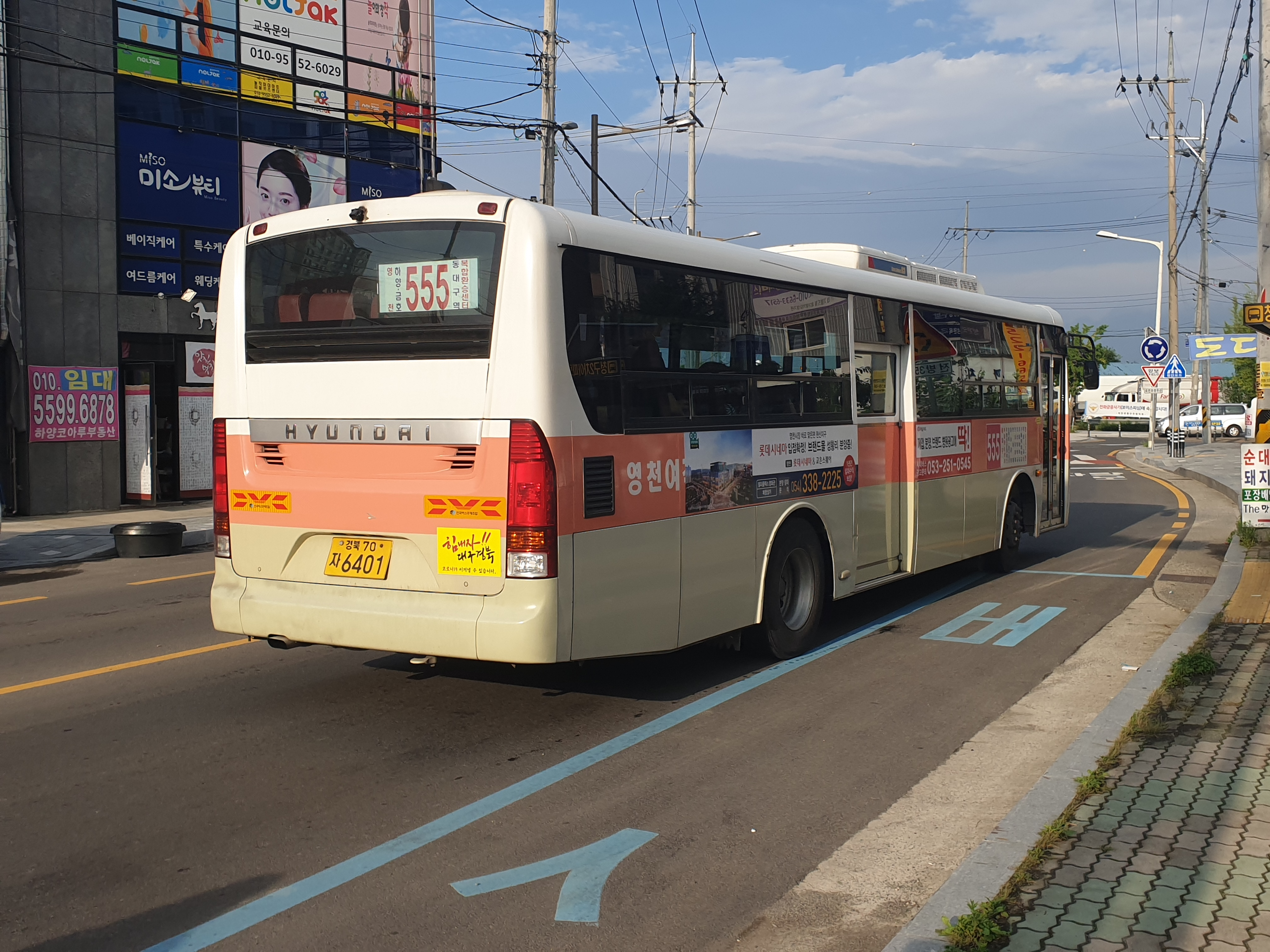 영천여객 555번 6401호 뉴 슈퍼에어로시티